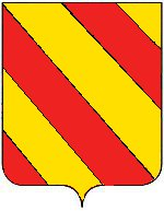 Stemma dei De Tocco delle Bande - fonte bibliografica: F. Campanile, L'armi, overo insegne de'Nobili ... d'alcune Famiglie Nobili, Napoli, 1610, p. 90.